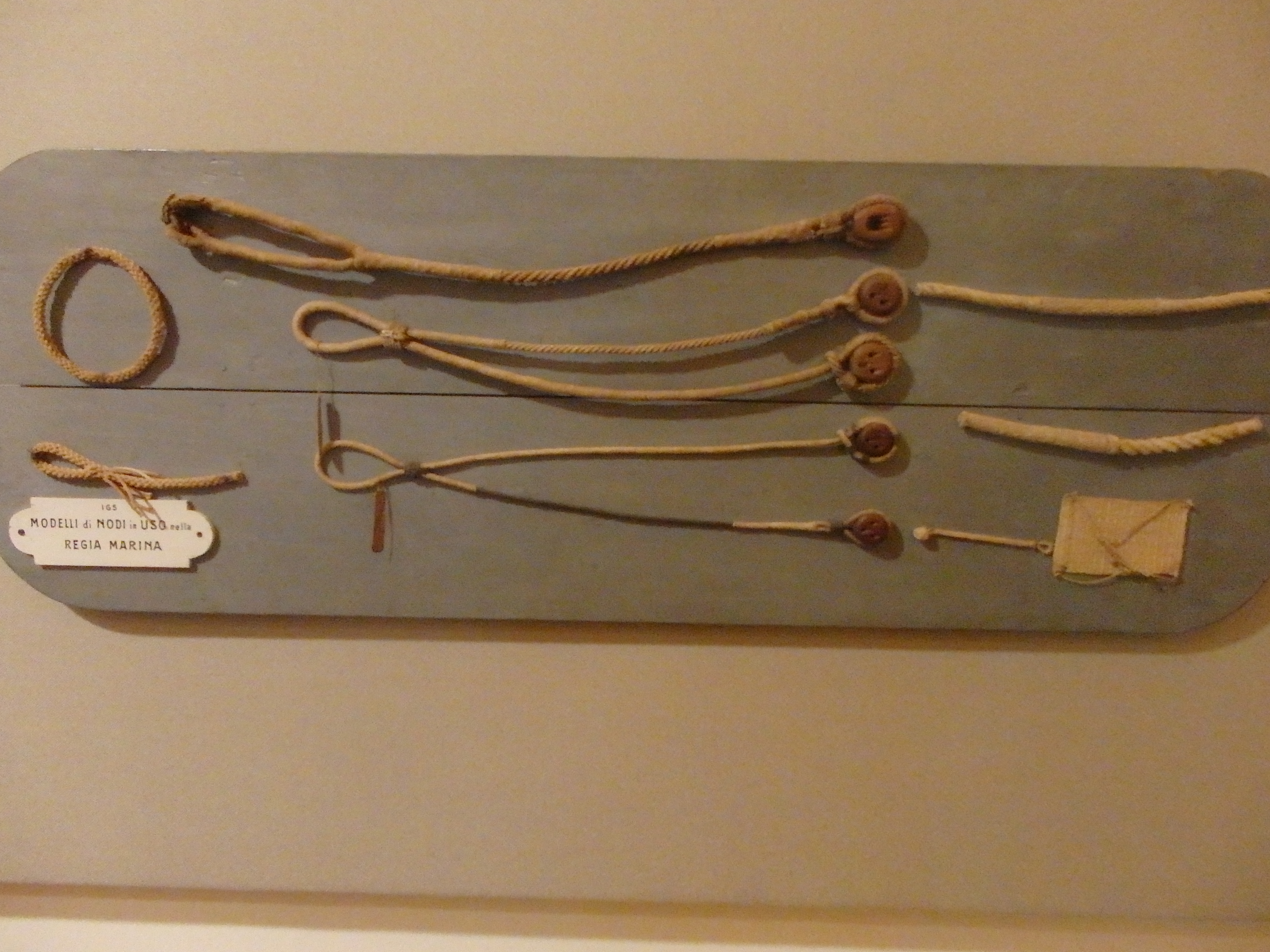 Viste dal Vomero, Napoli.